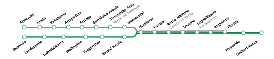 MAPA TRANVIA VITORIA